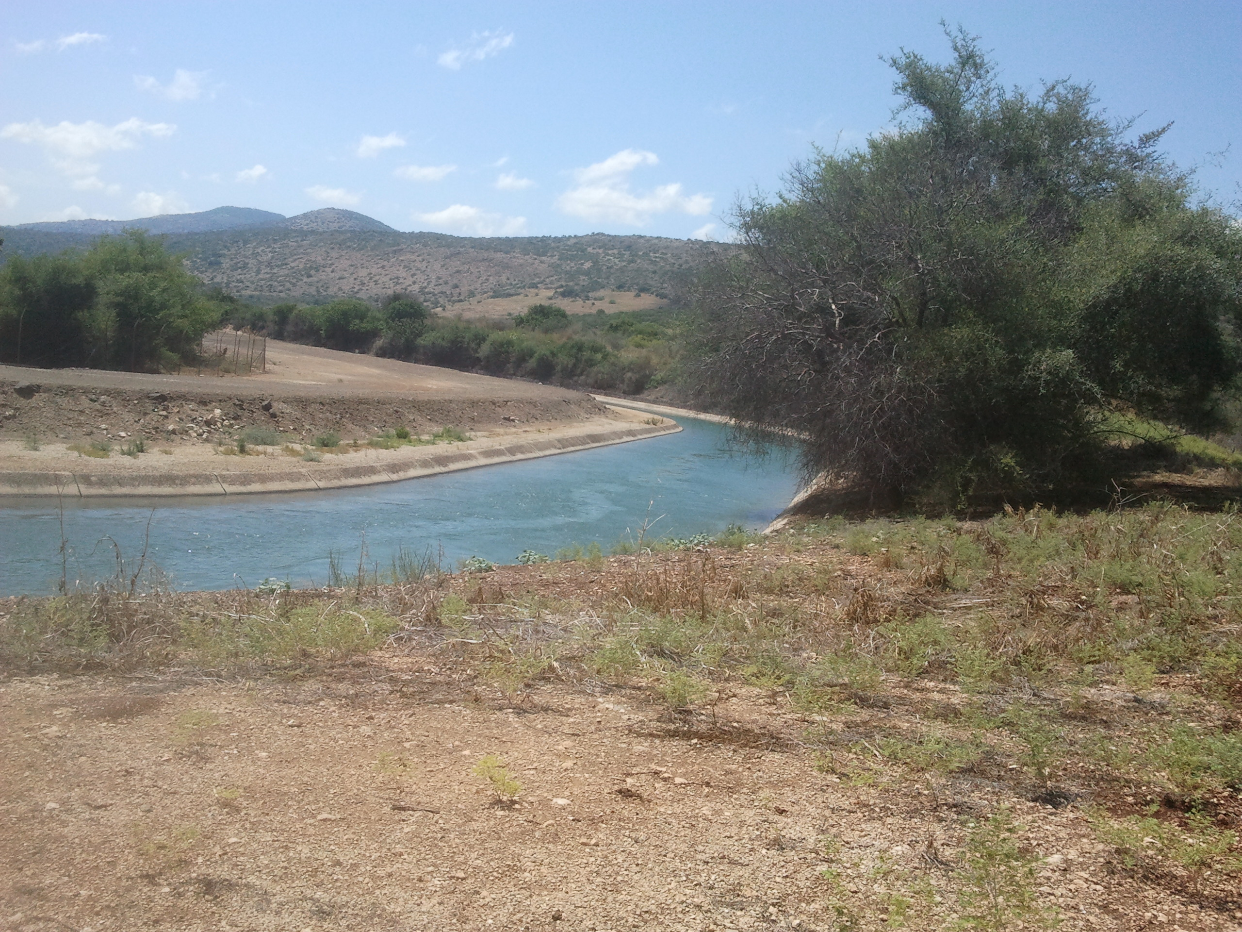 המוביל הארצי ליד קדרים בגליל העליון